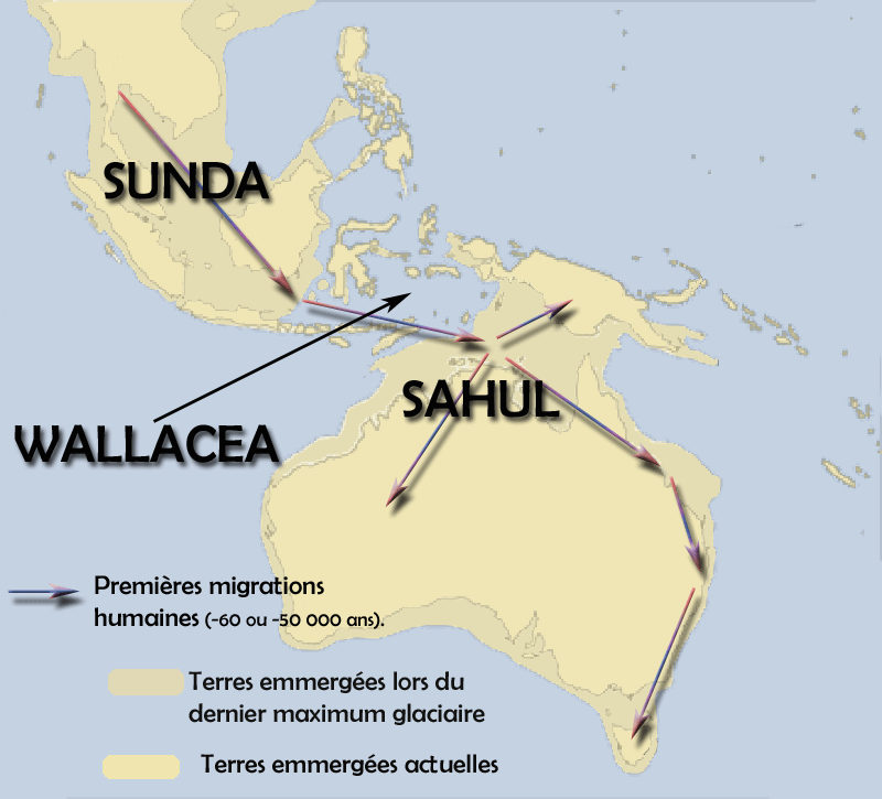 Premières migrations humaine à travers le sunda et le sahul. -60 à 50 000 années.